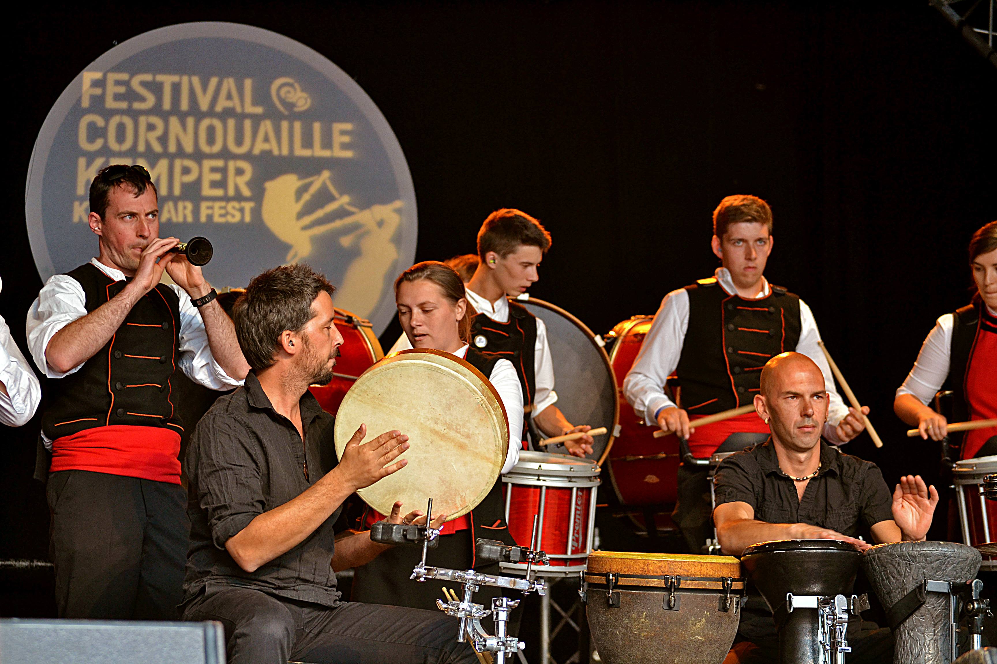 Sonerien Bro Montroulez, bagad de Morlaix, lors du championnat national des bagadoù de 3e catégorie au Festival de Cornouaille à Quimper le 25 juillet 2015.